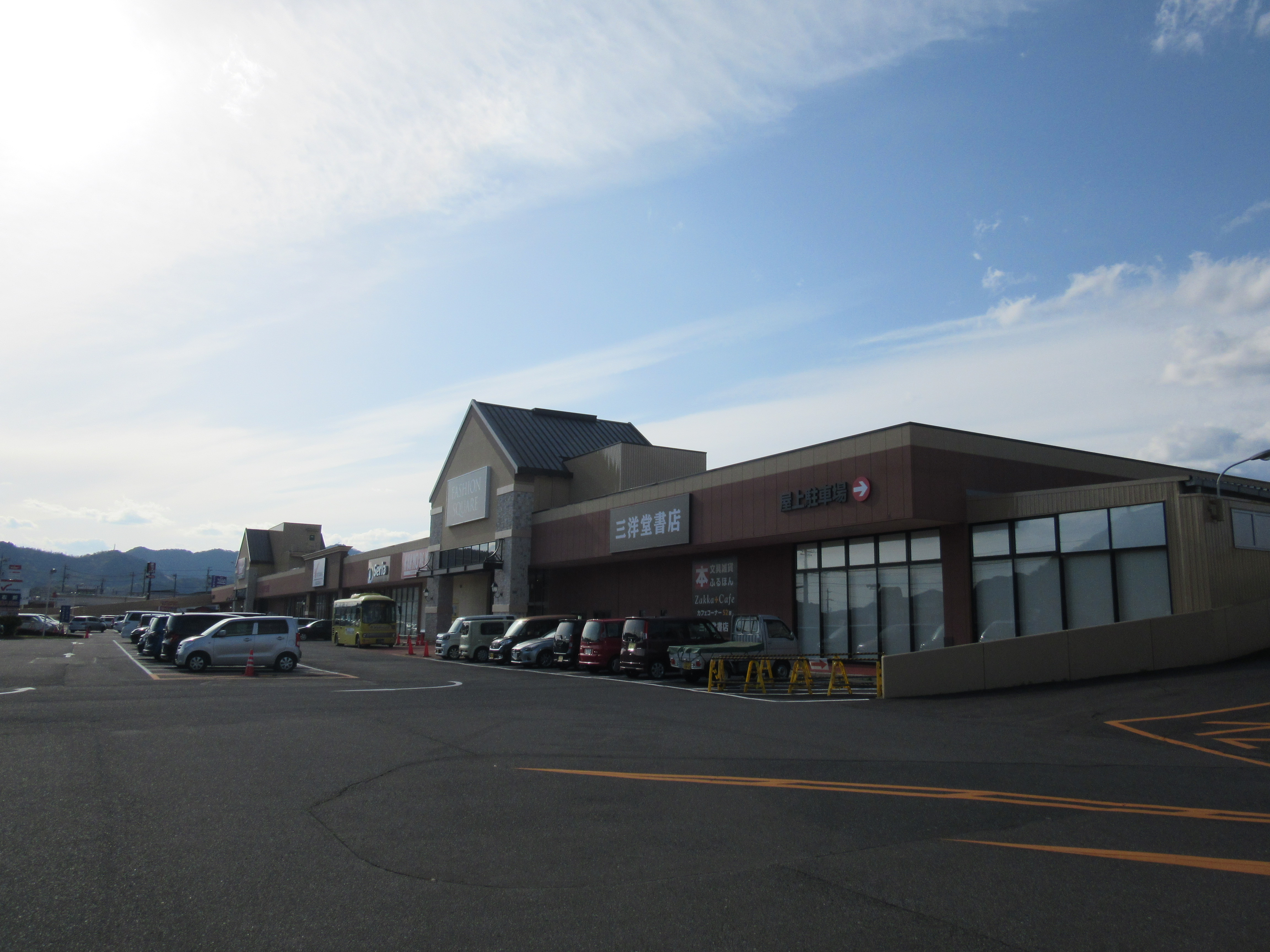 Vタウン芥見